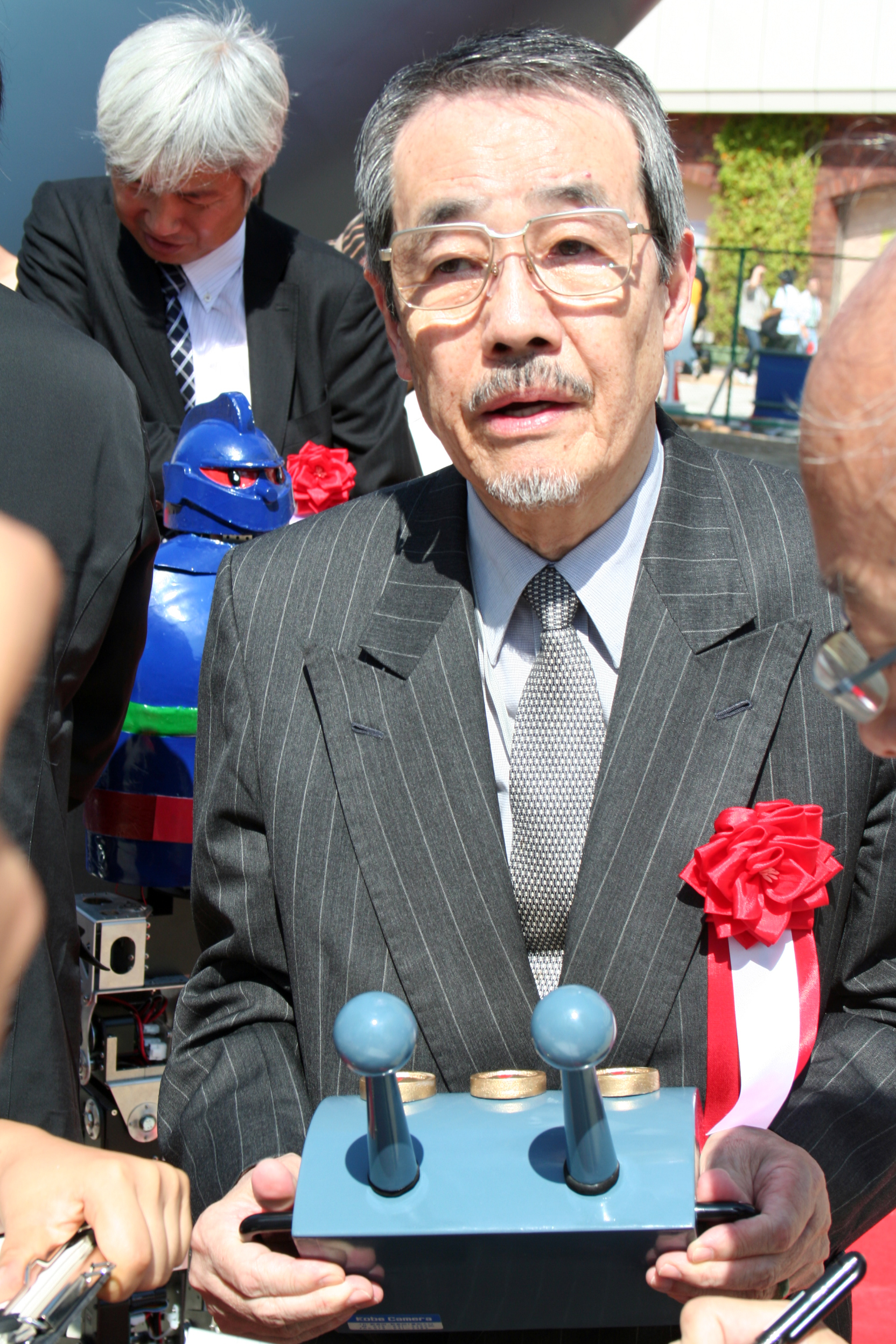 矢田稔。日本・東京出身の声優。2009年10月4日、兵庫県神戸市長田区若松公園にて開催された鉄人28号像完成記念式典にて撮影。 鉄人28号像の前でマスコミのインタビューに答える矢田稔。手に持っているのは鉄人28号の操縦装置。左奥の白髪の人物は愛知工業大学工学部の古橋秀夫教授。教授の前にあるものは同大制作の鉄人5号。